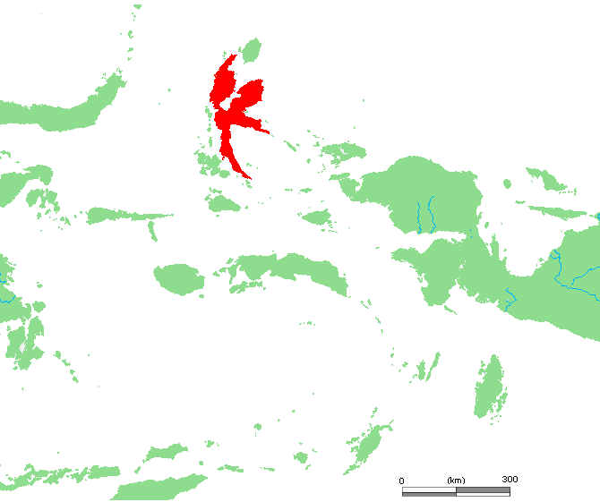 ID Halmahera.PNG